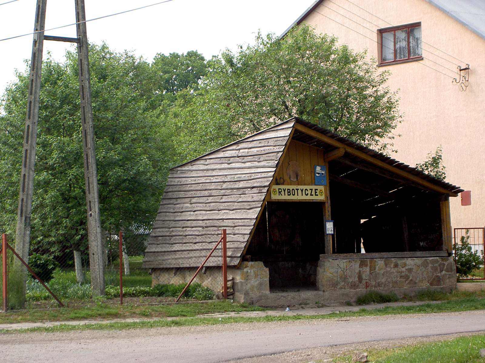 Rybotycze, Przystanek • Rybotycze, Poland - Bus stop